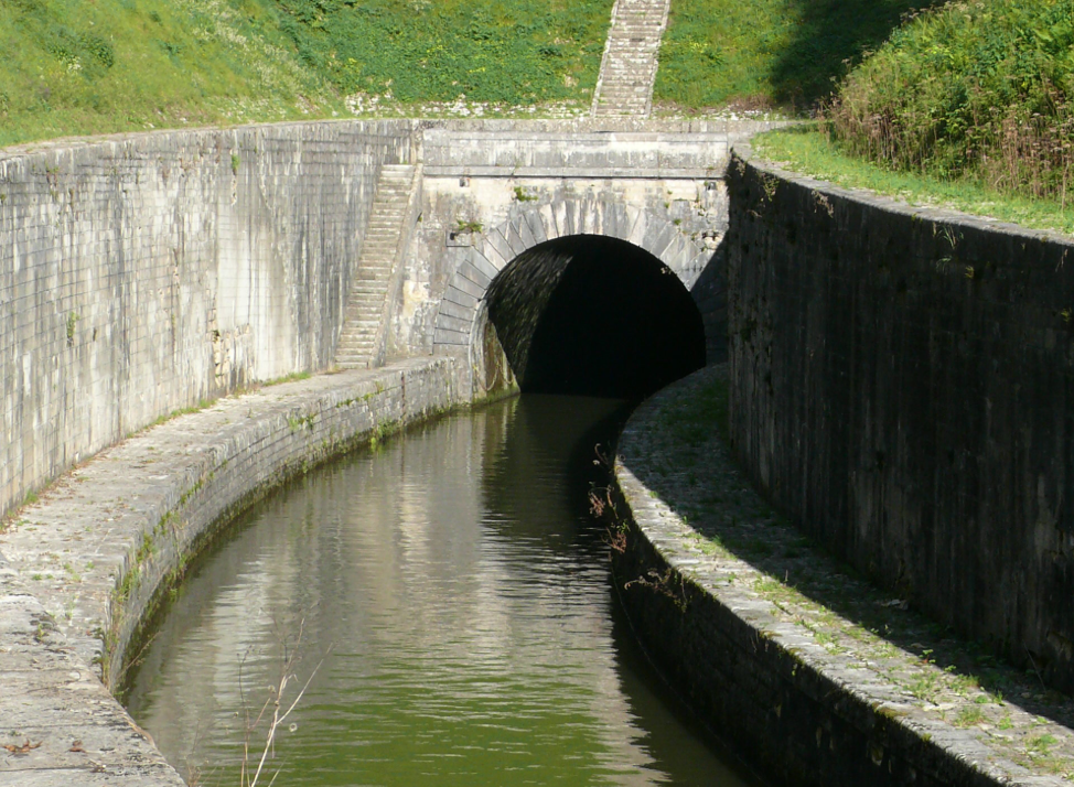 Haute Saône